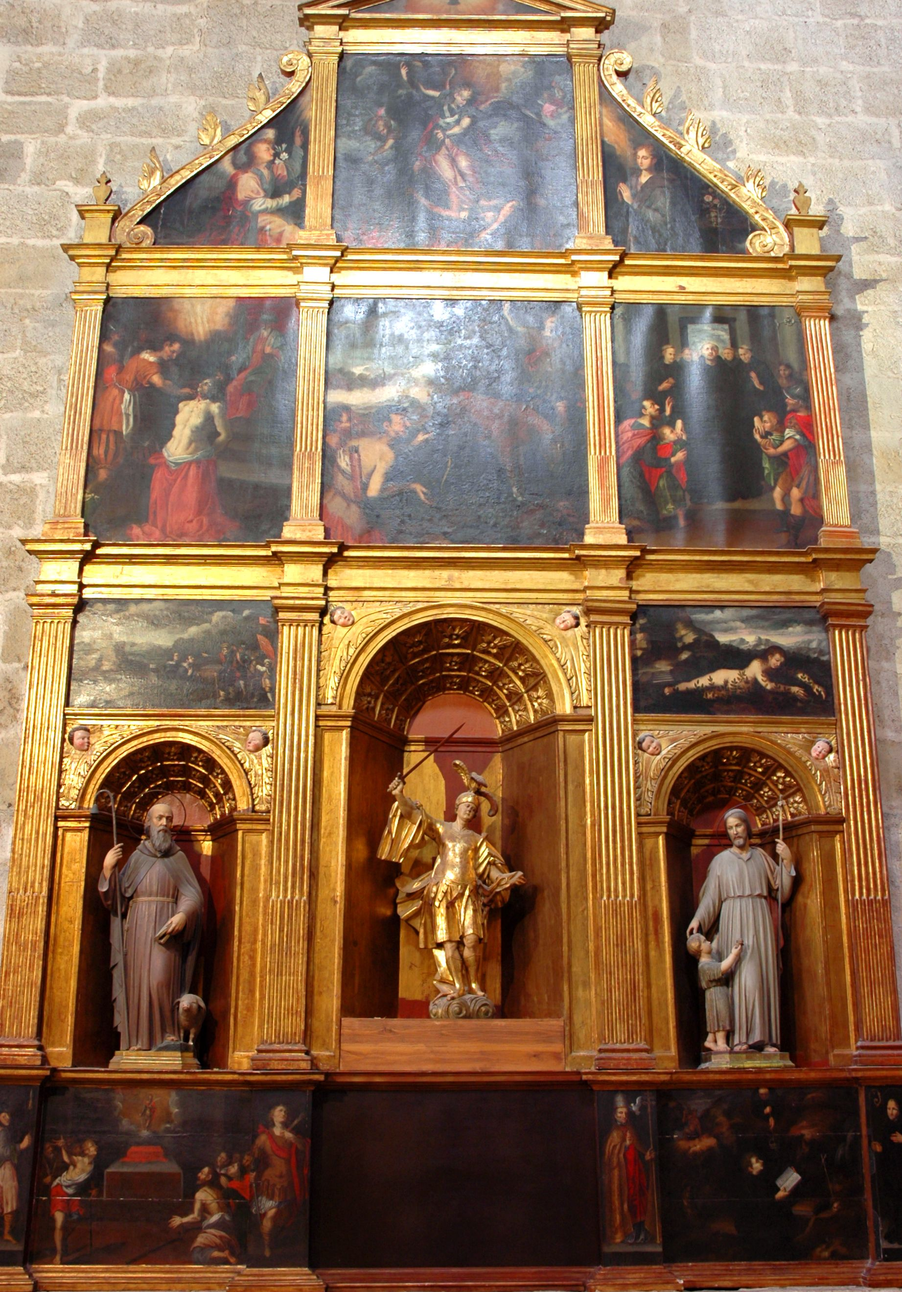 Monestir de Sant Cugat - Retaule de Sant Miquel